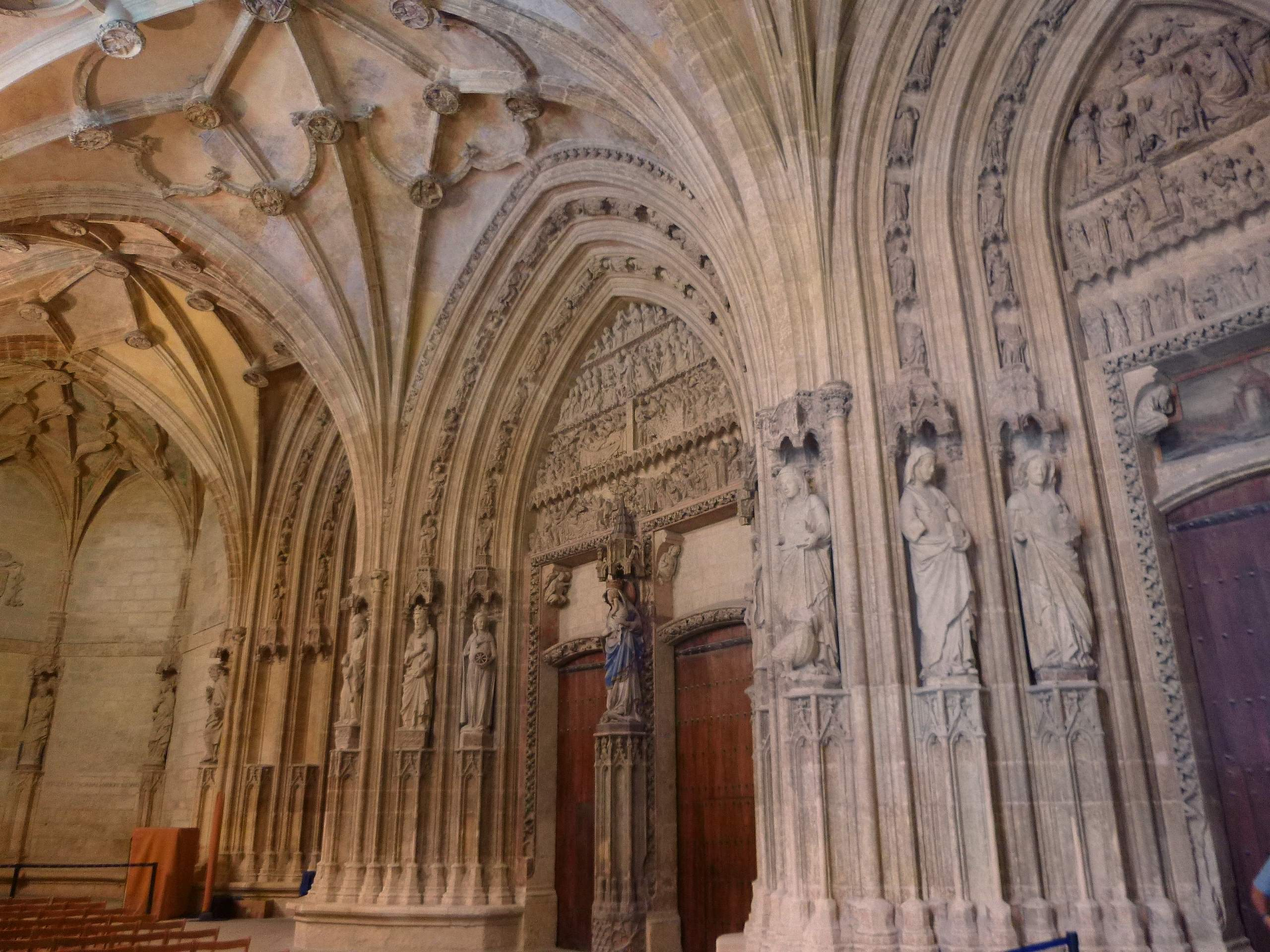 Pórtico de la Catedral de Santa María ('Catedral Vieja') de Vitoria-Gasteiz